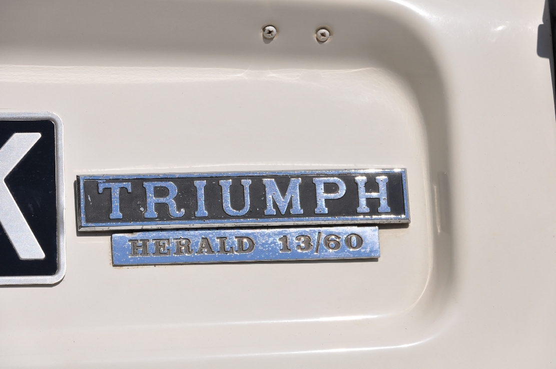 Nettuno in Italien 2012